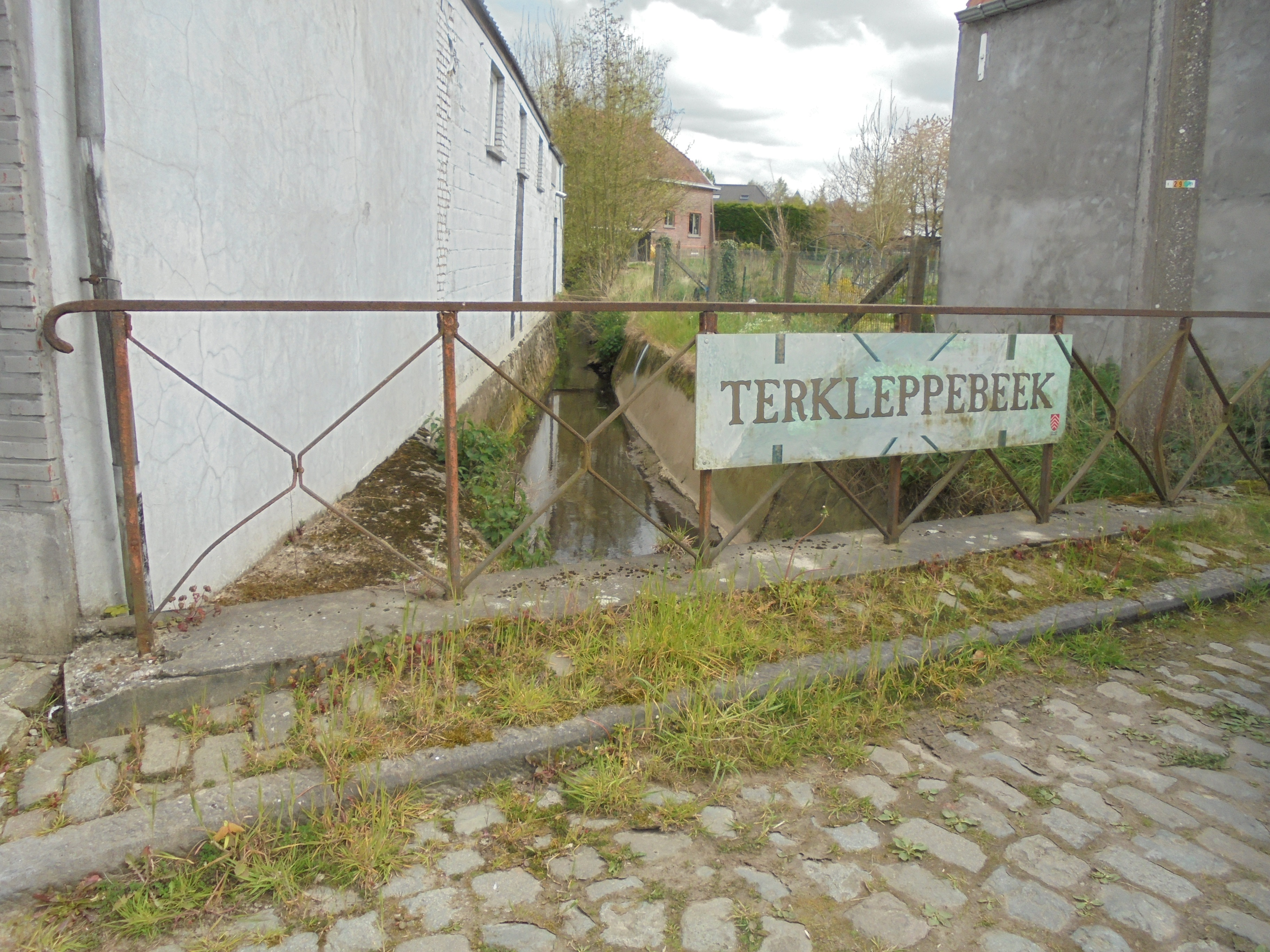 De Terkleppebeek op de plaats waar de Spinele en de Nestor Debeckstraat samenkomen - Everbeek-Beneden - Everbeek - Brakel - Oost-Vlaanderen - België